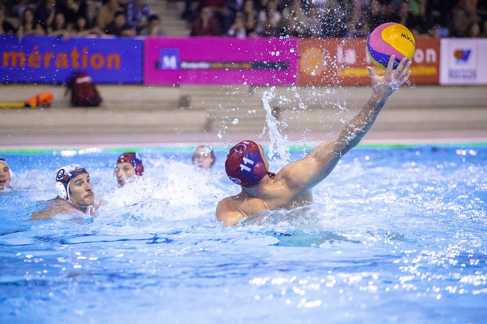 Montpellier Water Polo vs Jug Dubrovnik / Ligue des Champions 2012 - ©Roikiine